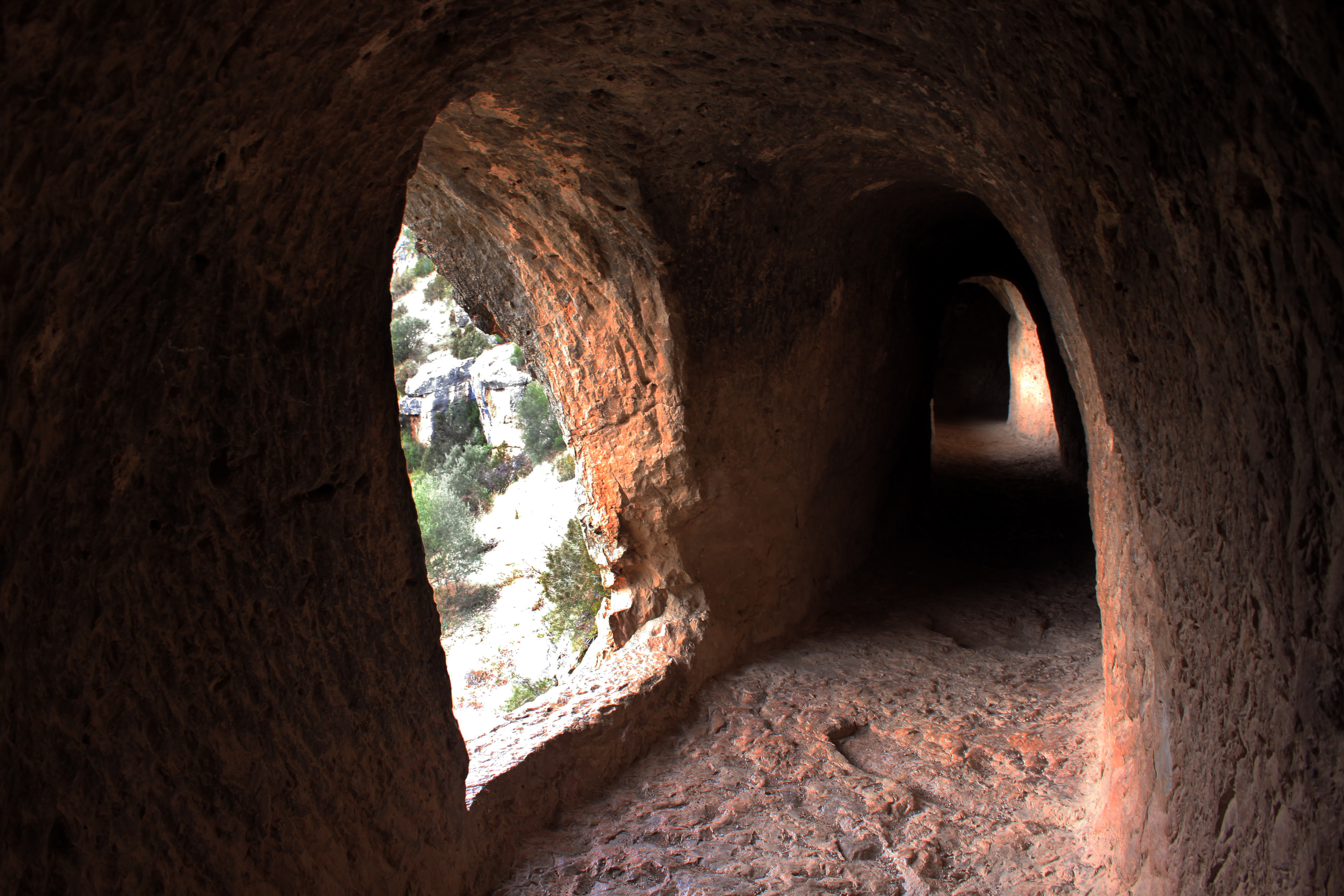 Interior del viaducto romano de Peña Cortada, se observa una de las ventanas de ventilación. Municipio de Calles, provincia de Valencia, Comunidad valenciana, España.